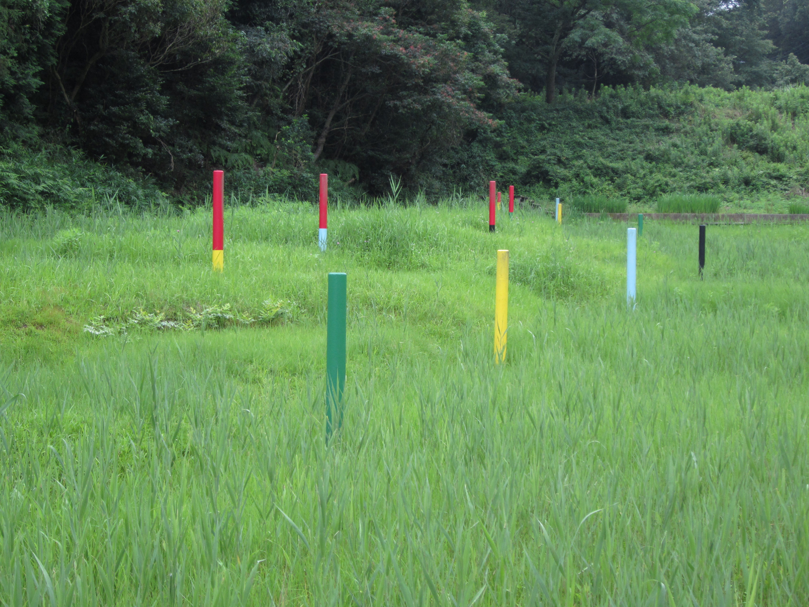 深溝断層（額田郡幸田町、2012年）